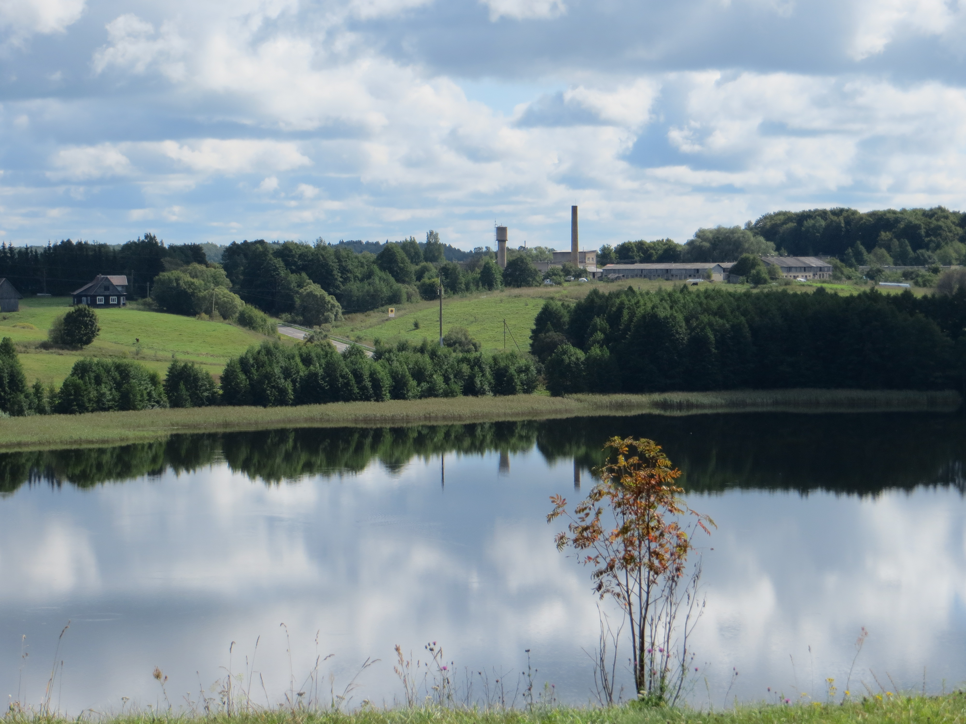 Dūkšto sen., Lithuania